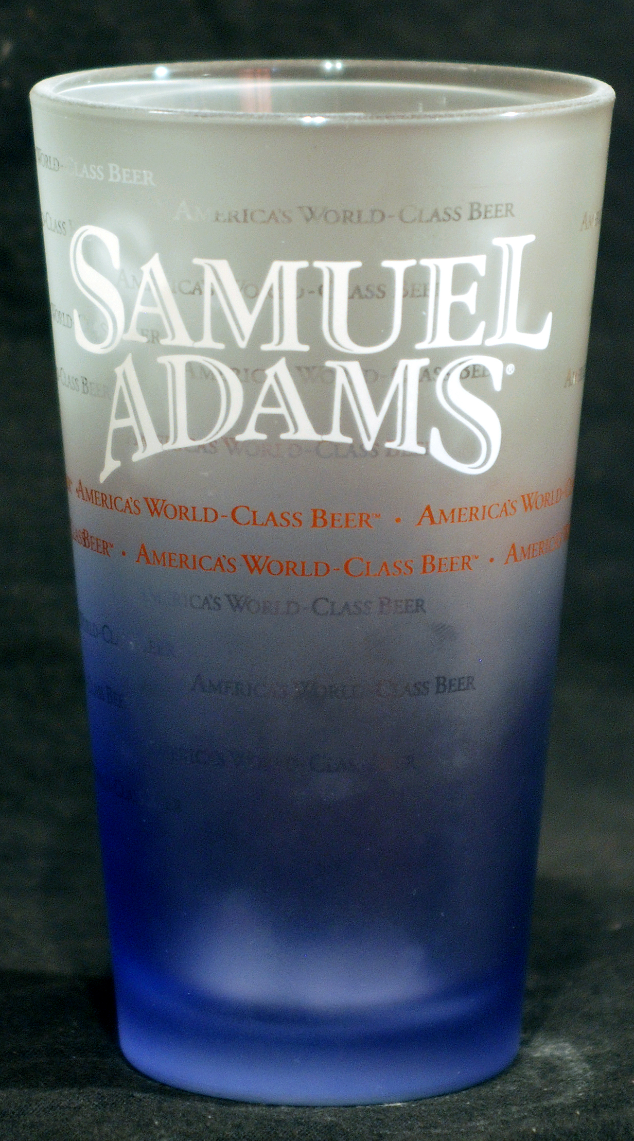 Samuel Adams beer glass